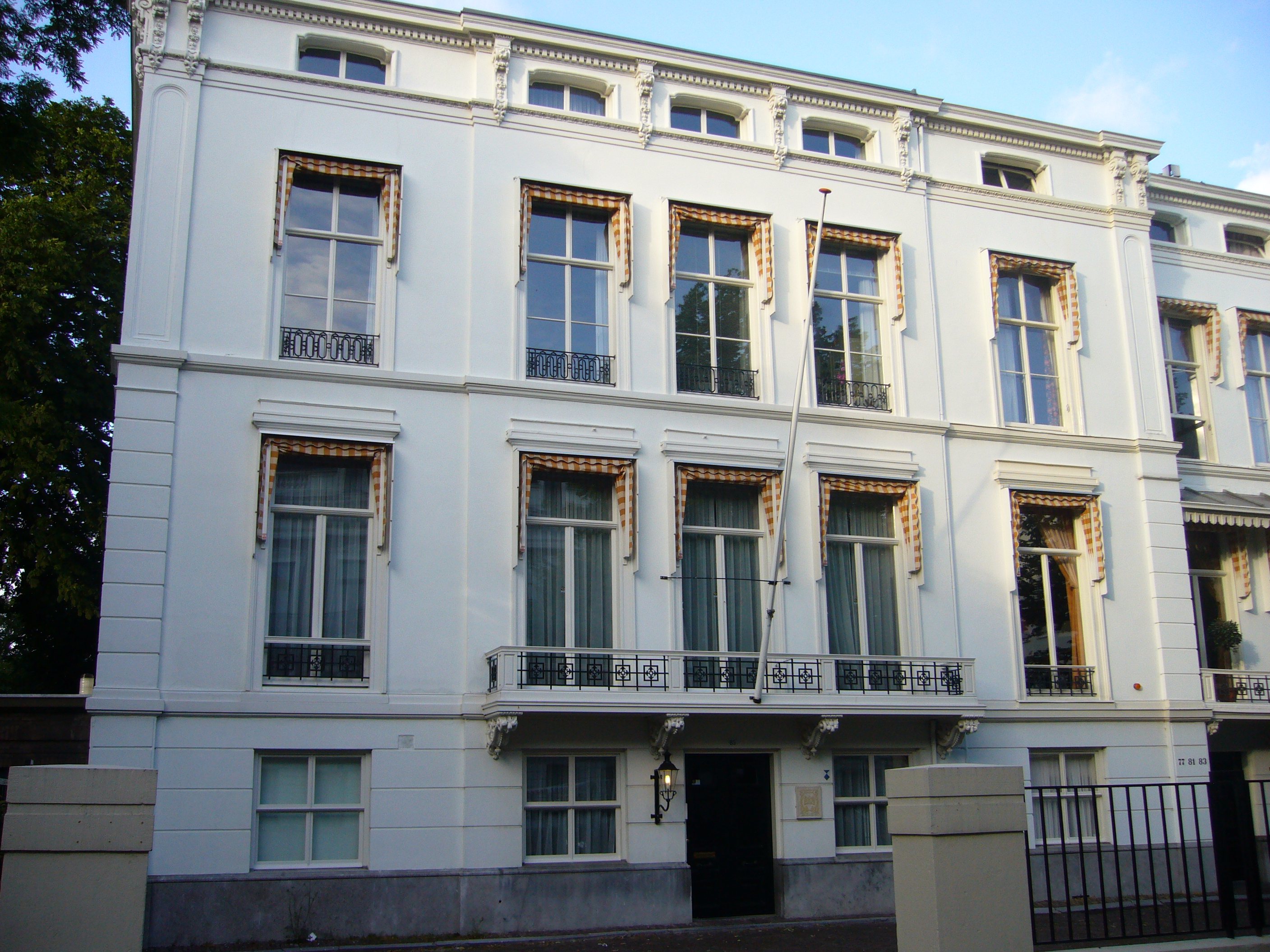 Oorlogsgravenstichting in Den Haag